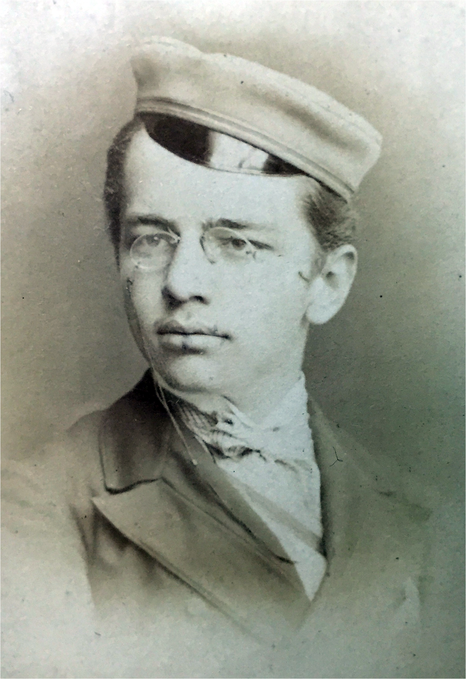 Porträtfotografie von Franz Pfaff als Corpsstudent in Leipzig